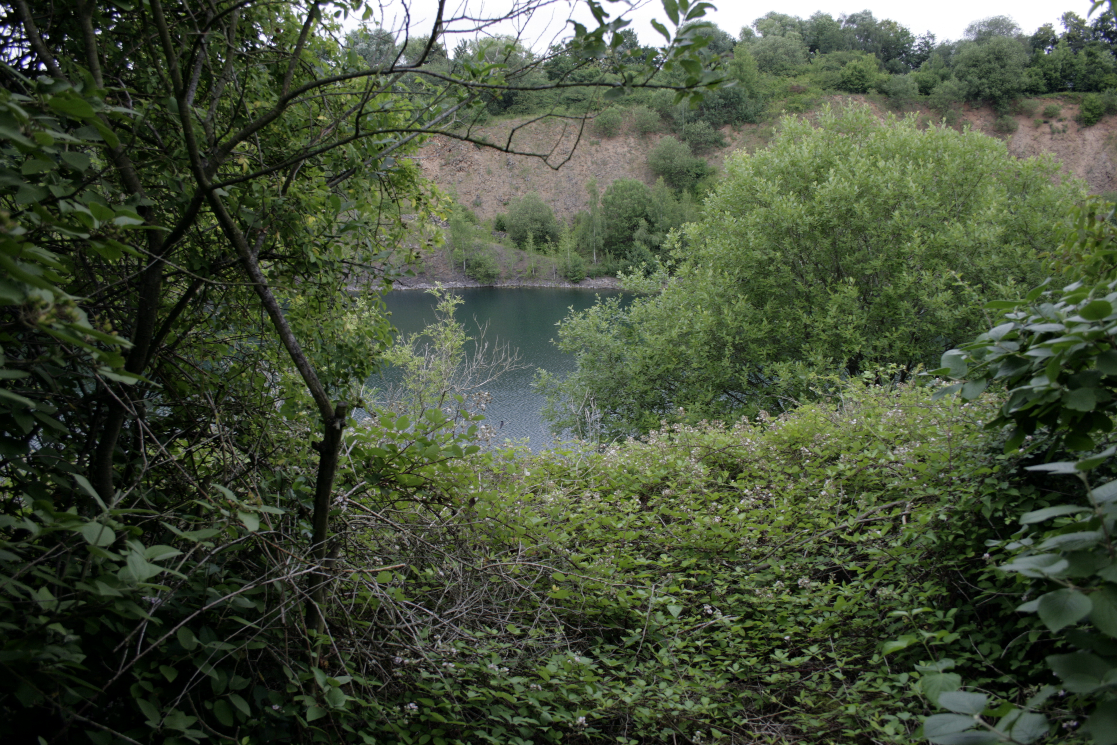 Ehemaliger Basaltsteinbruch, heute Naturschutzgebiet in Limburg-Ahlbach, Deutschland